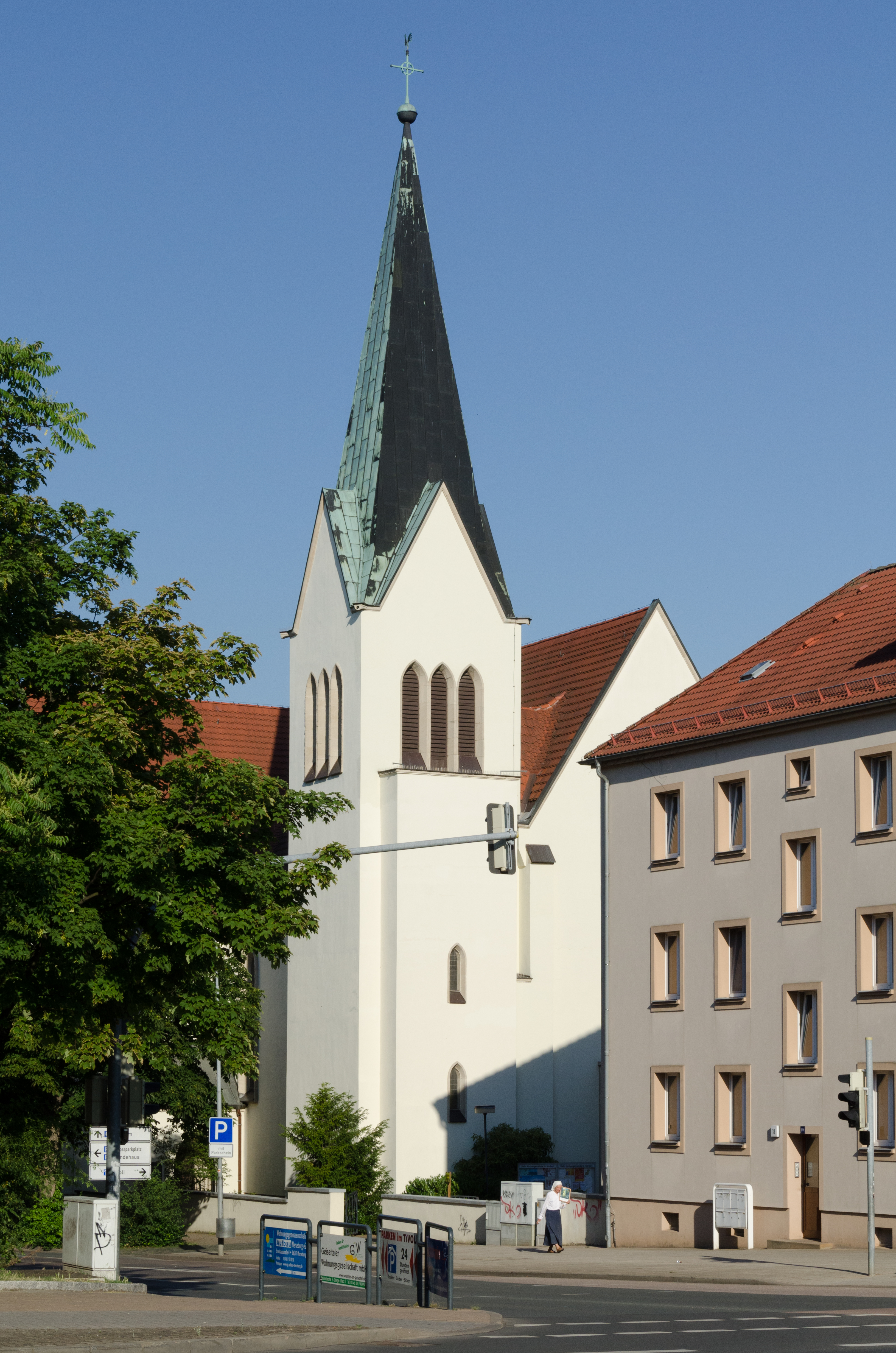 Merseburg, Bahnhofstraße 14, St. Norbert